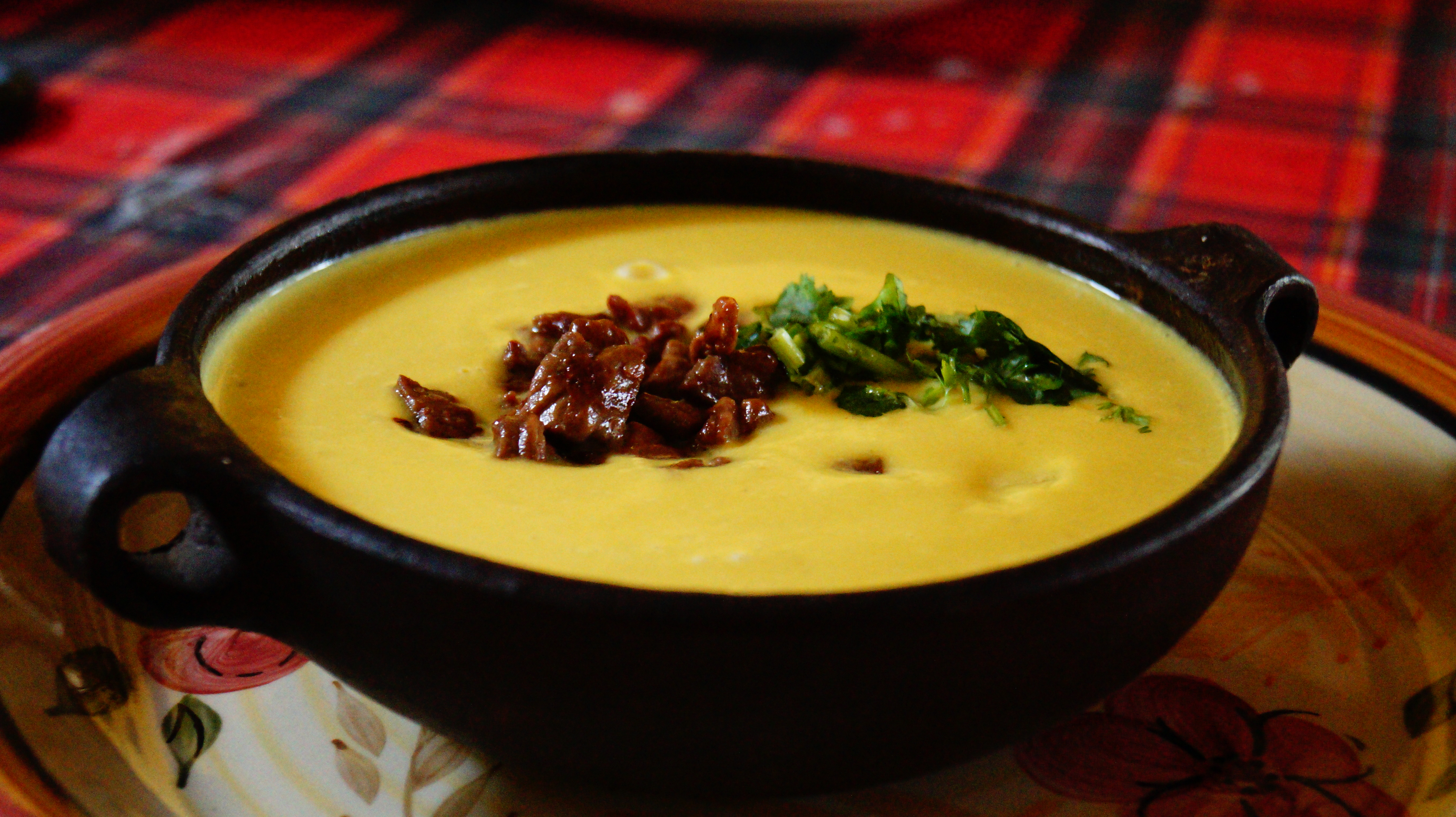 Crema de zapallo fresco con garnitura de carne de cordero salteada y un poco de cilantro al oliva para dar frescura